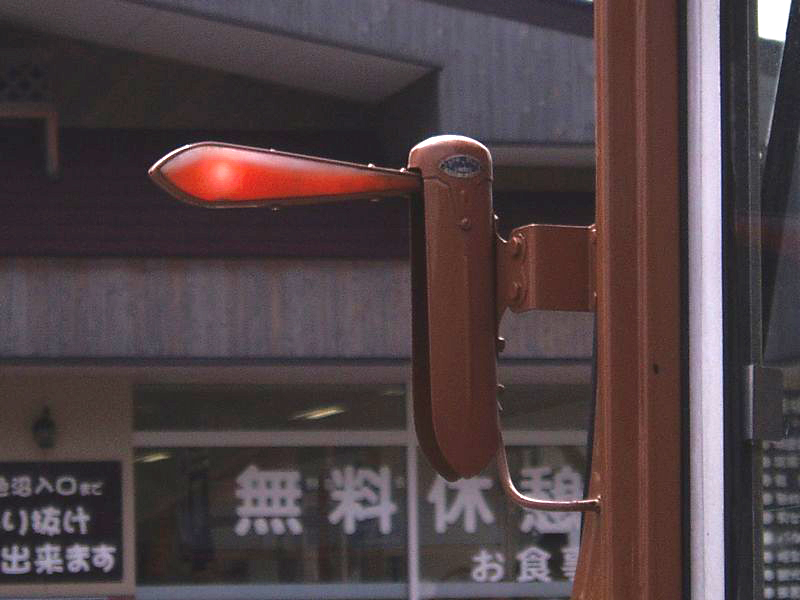 「アポロ」と呼ばれる矢羽式方向指示器の例（動作状態）磐梯東都バス「森のくまさん号」.